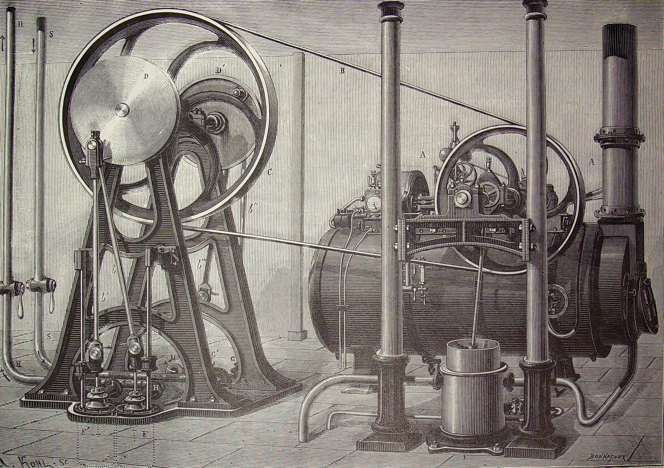 Ilustraciones pertenecientes al libro : El mundo físico : gravedad, gravitación, luz, calor, electricidad, magnetismo, etc. / A. Guillemin. - Barcelona Montaner y Simón, 1882